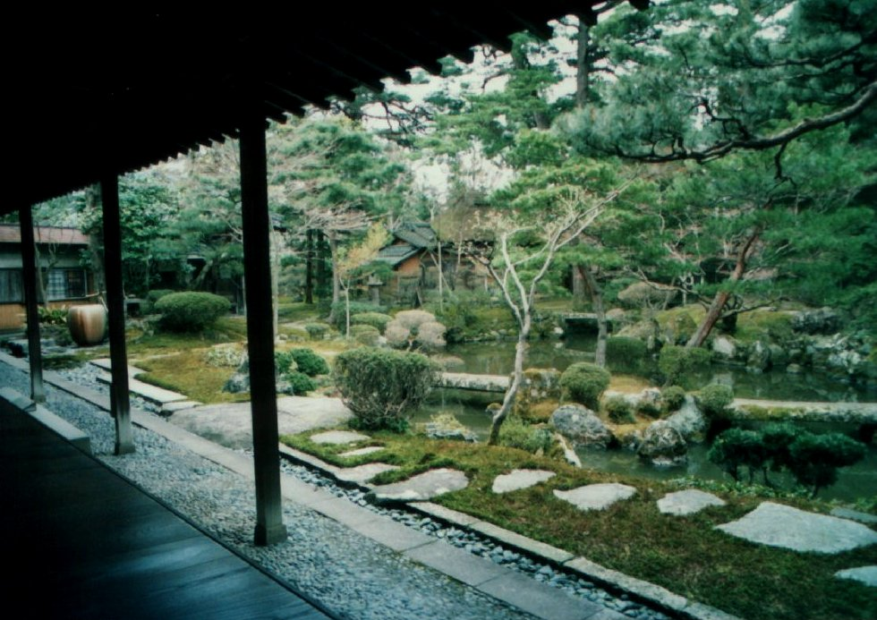 北方文化博物館となっている伊藤邸の庭園。